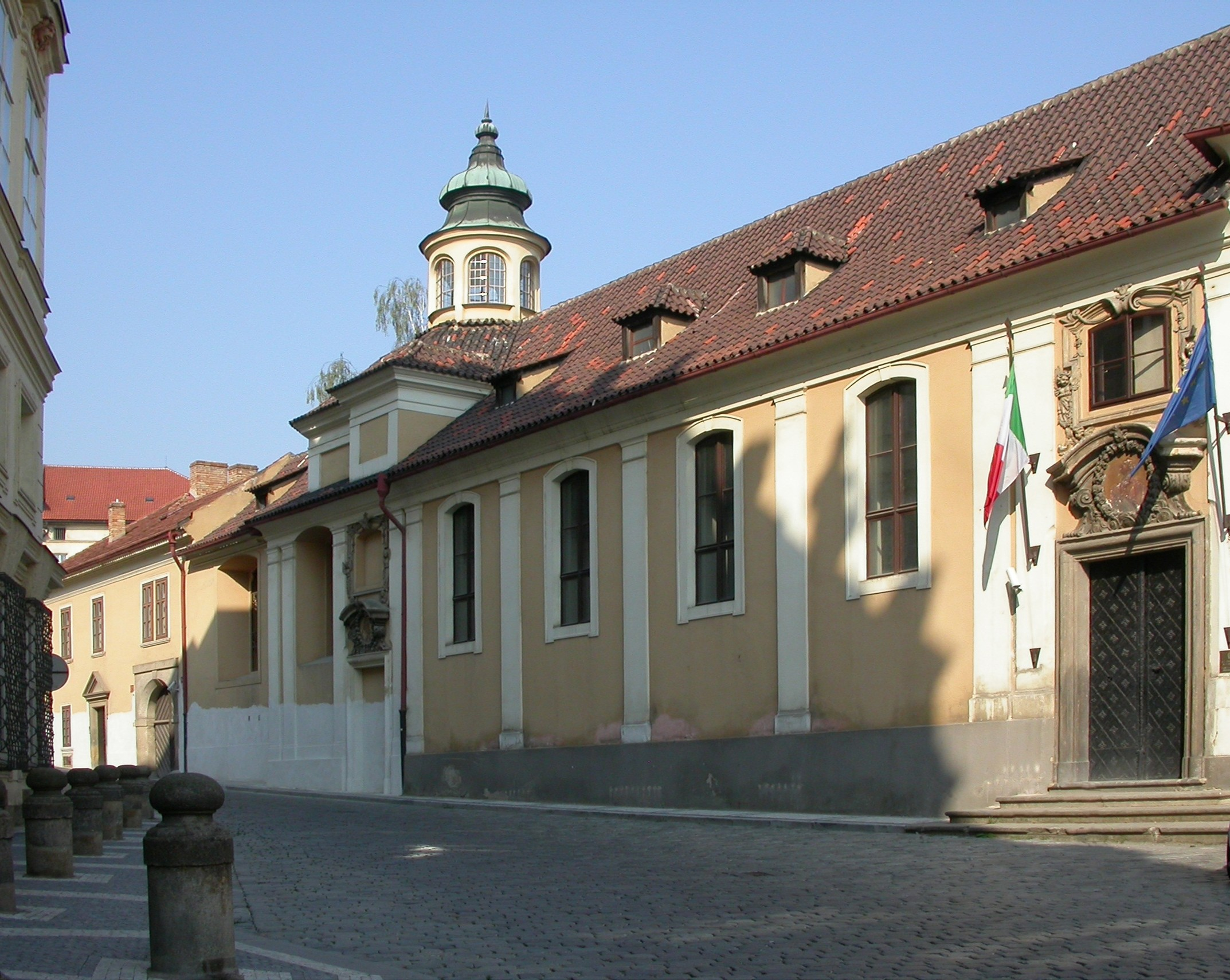 Vista della Cappella sulla Vlasska, la "Via degli italiani"